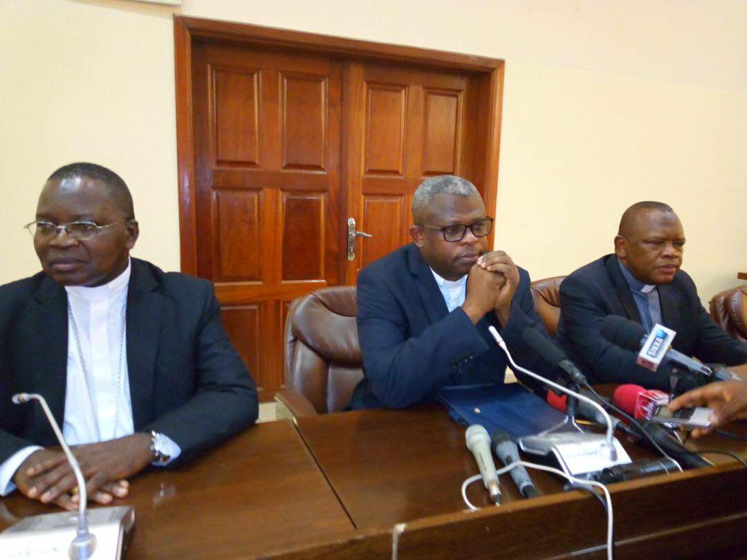 Les évêques de la Cenco (Conférence épiscopale nationale du Congo) lors d'un point de presse à Kinshasa, 11 janvier 2017. (Top Congo/VOA)De gauche à droite : Mgr Marcel Utembi Tapa, Abbé Donatien Nshole, Mgr Fridolin Ambongo (?)